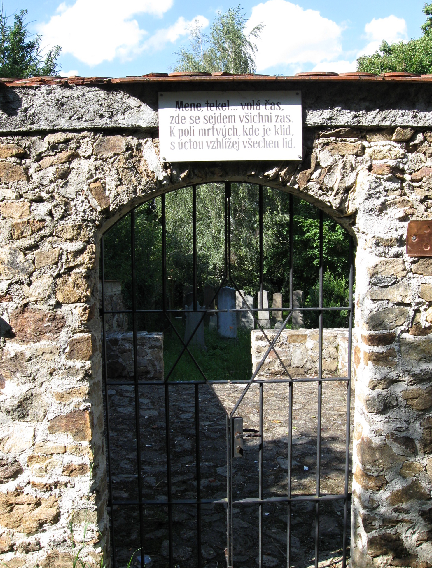 Židovský hřbitov (Vlachovo Březí), Vlachovo Březí